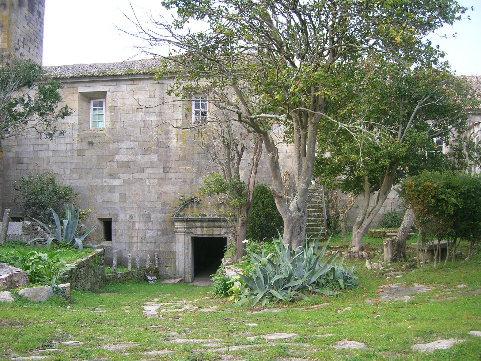 AExtremo sur del monasterio con la portada portada barroca meridional de acceso al monasterio. Mosteiro de Santa María de Oia